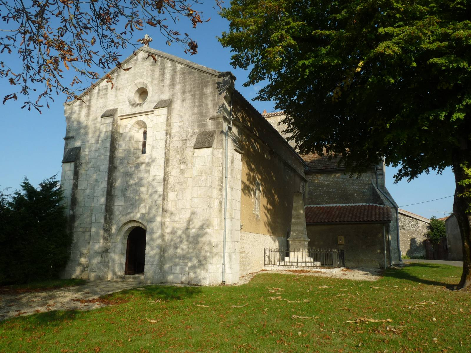 église d'Aubeville (16), France